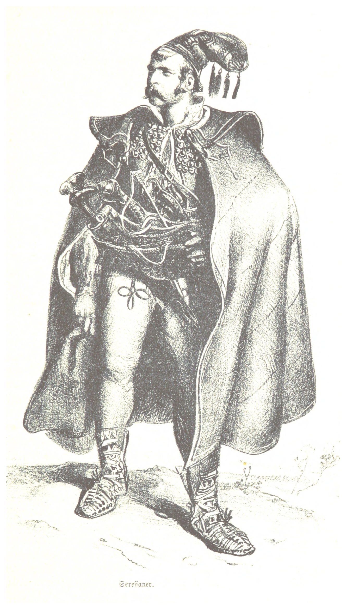 Seressaner